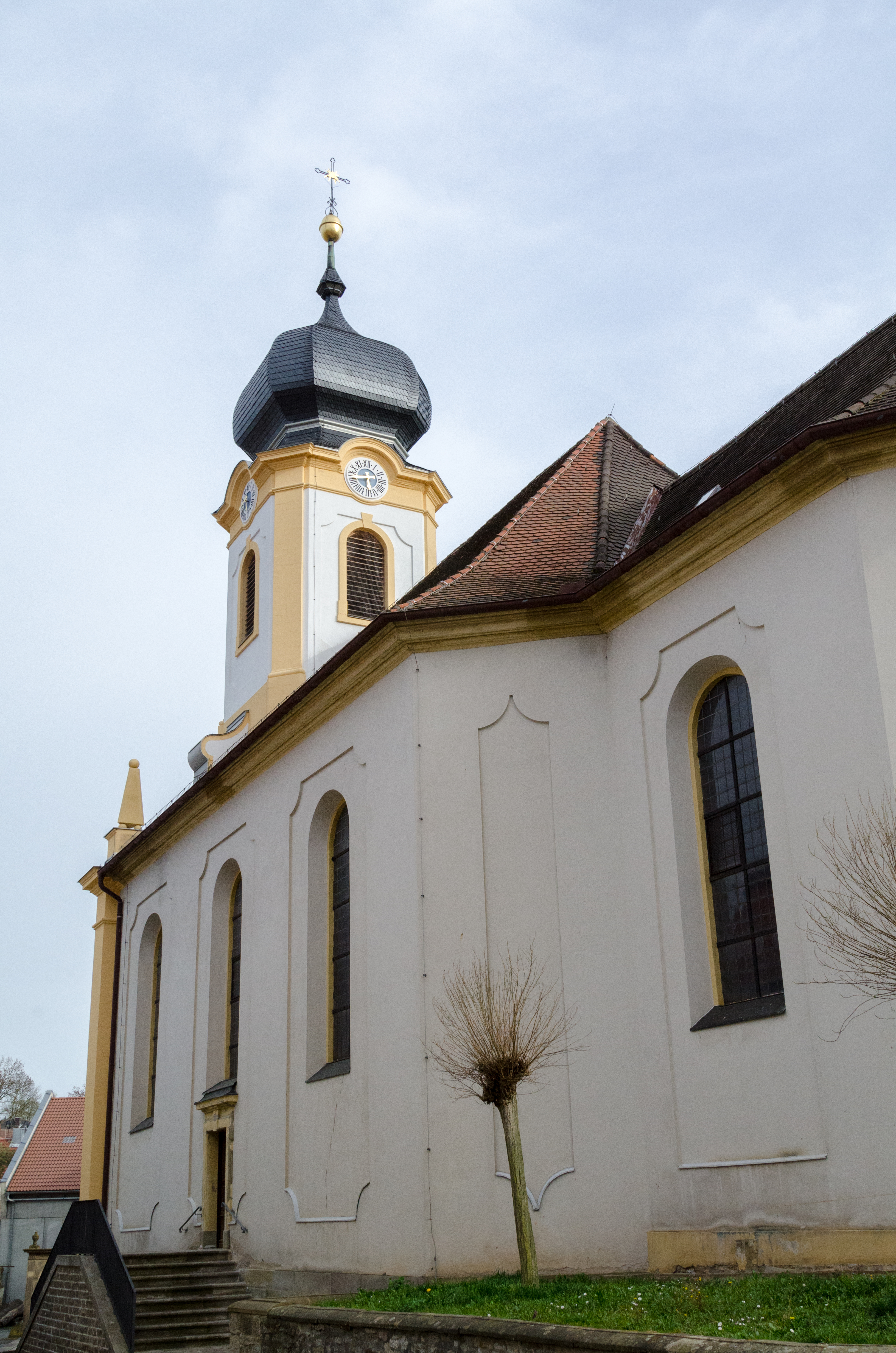 Katholische Kuratiekirche Allerheiligen in Theilheim